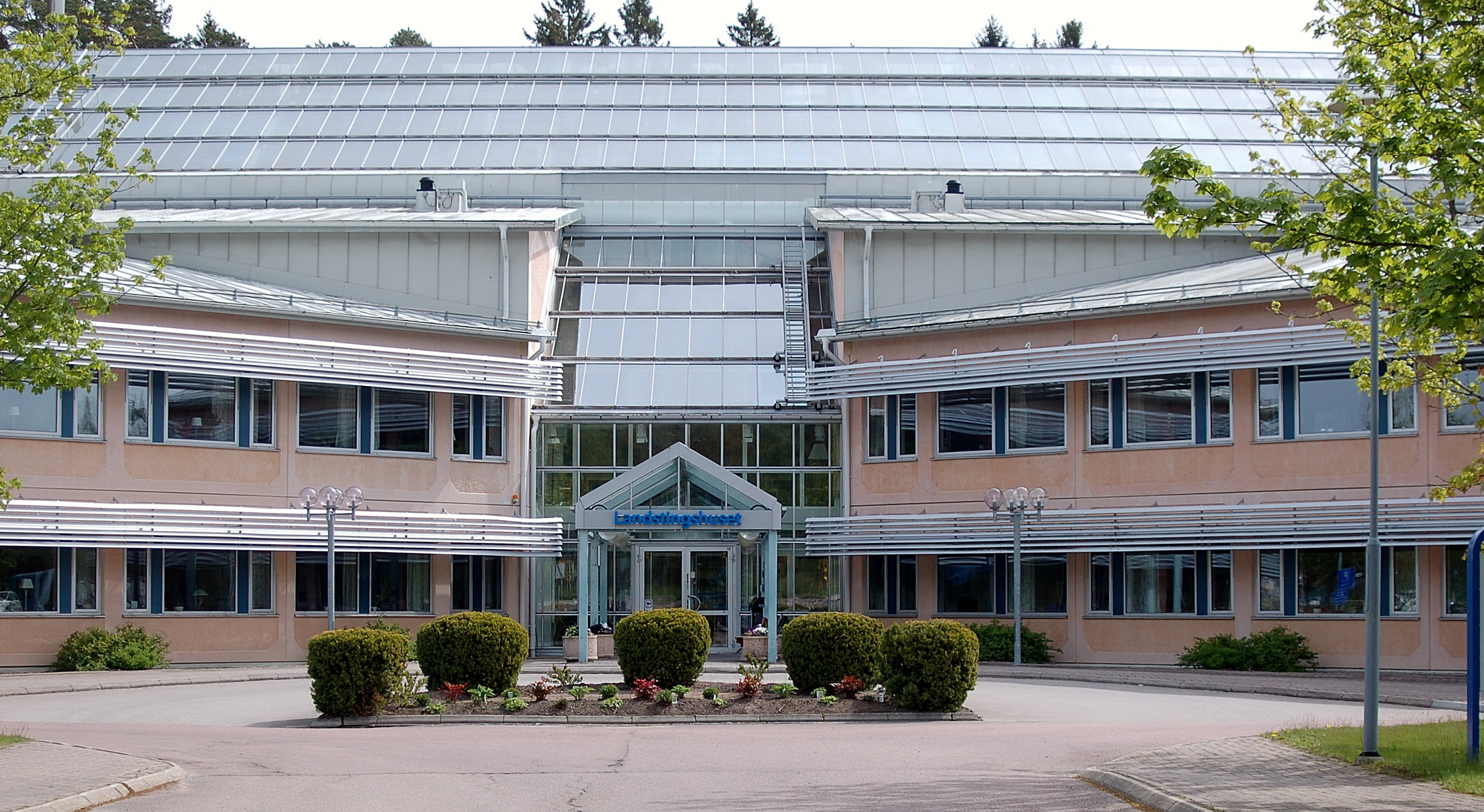 Landstingshuset Sommarro, Karlstad